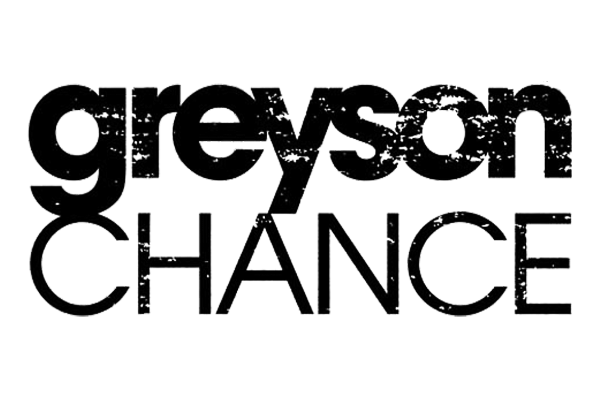 Greyson